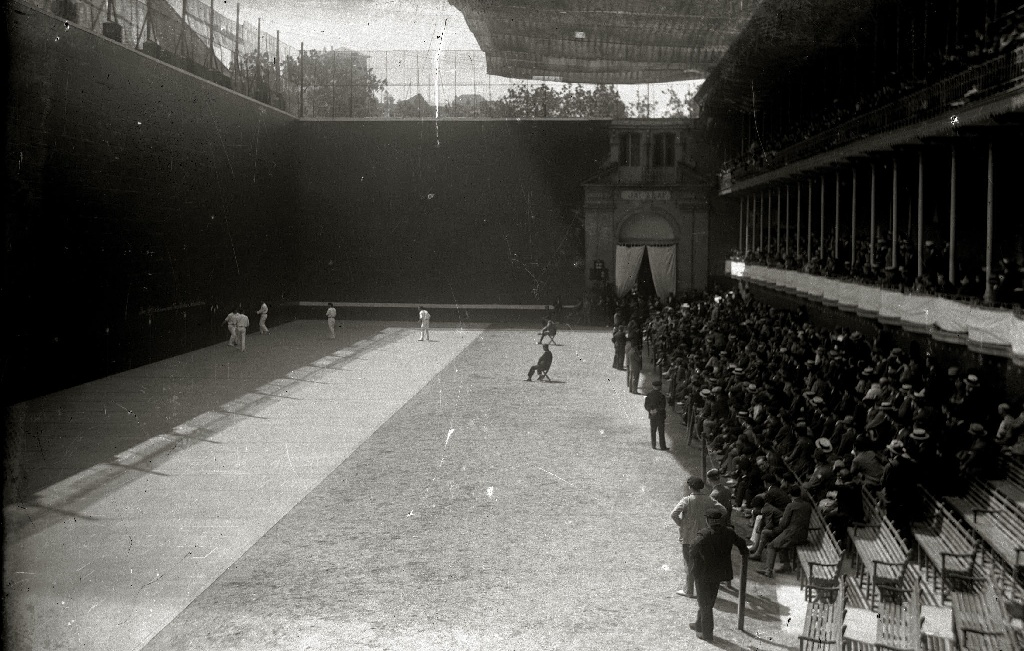 Partido de pelota en el frontón Jai Alai de Ategorrieta